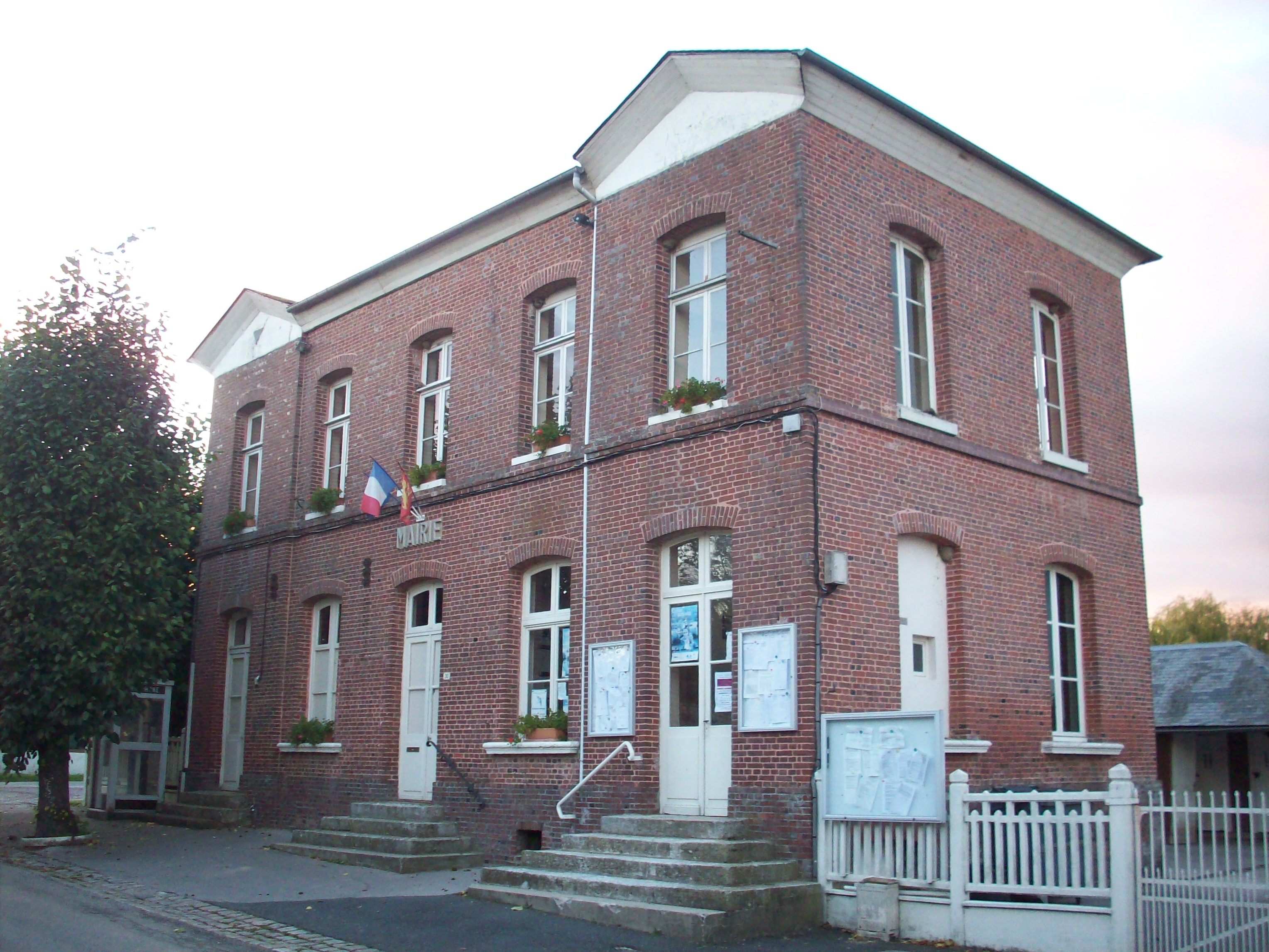 Mairie de la Haye.